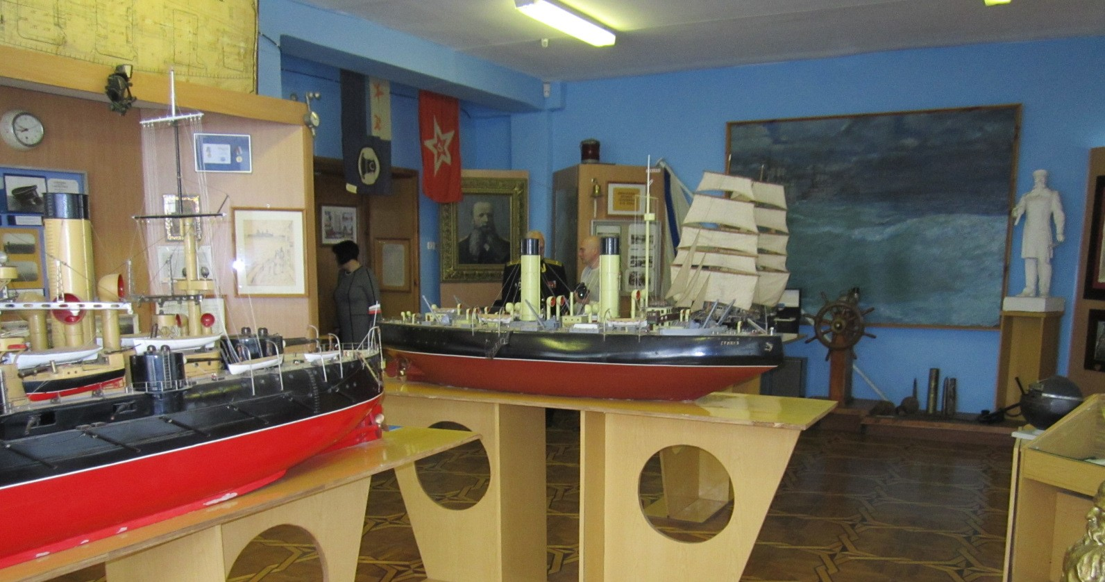 Muzey